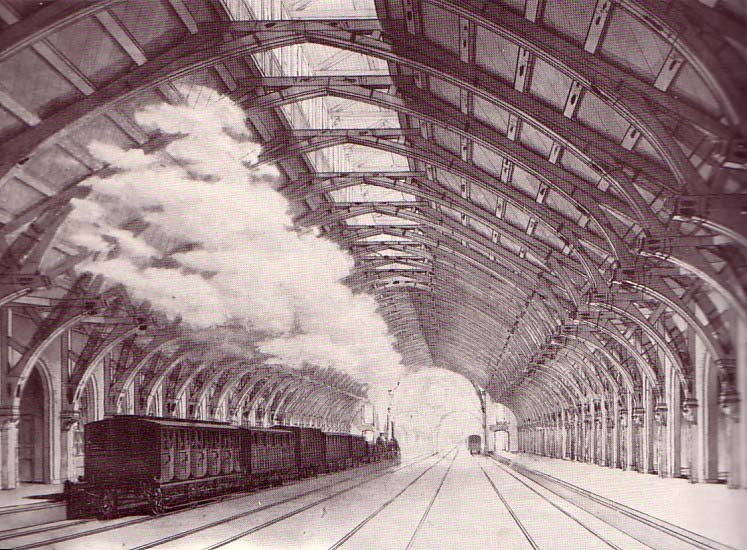 ehemaliger Berliner Bahnhof in Hamburg-Altstadt